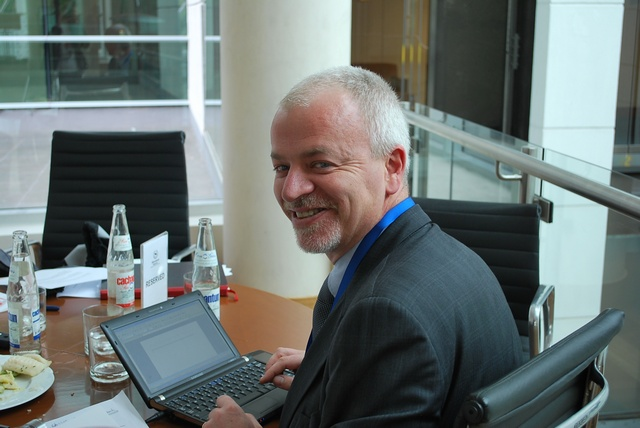 Lapo Pistelli, Progressive Governance Conference 2009 in Chile.